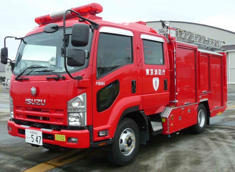 Isuzu Forward fire engine.